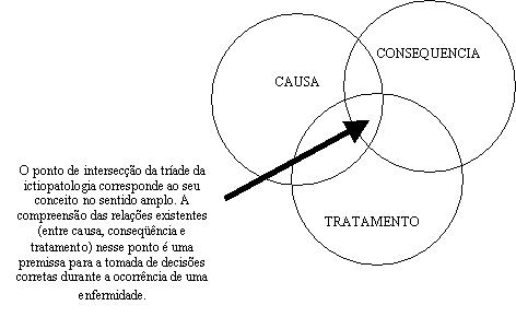 Descrição; Ilustraçao da Tríade da causa, consequencia e tratamento. tamanho: 23,3kb Data 20.02.2007 Autor: Rodrigo Mabilia